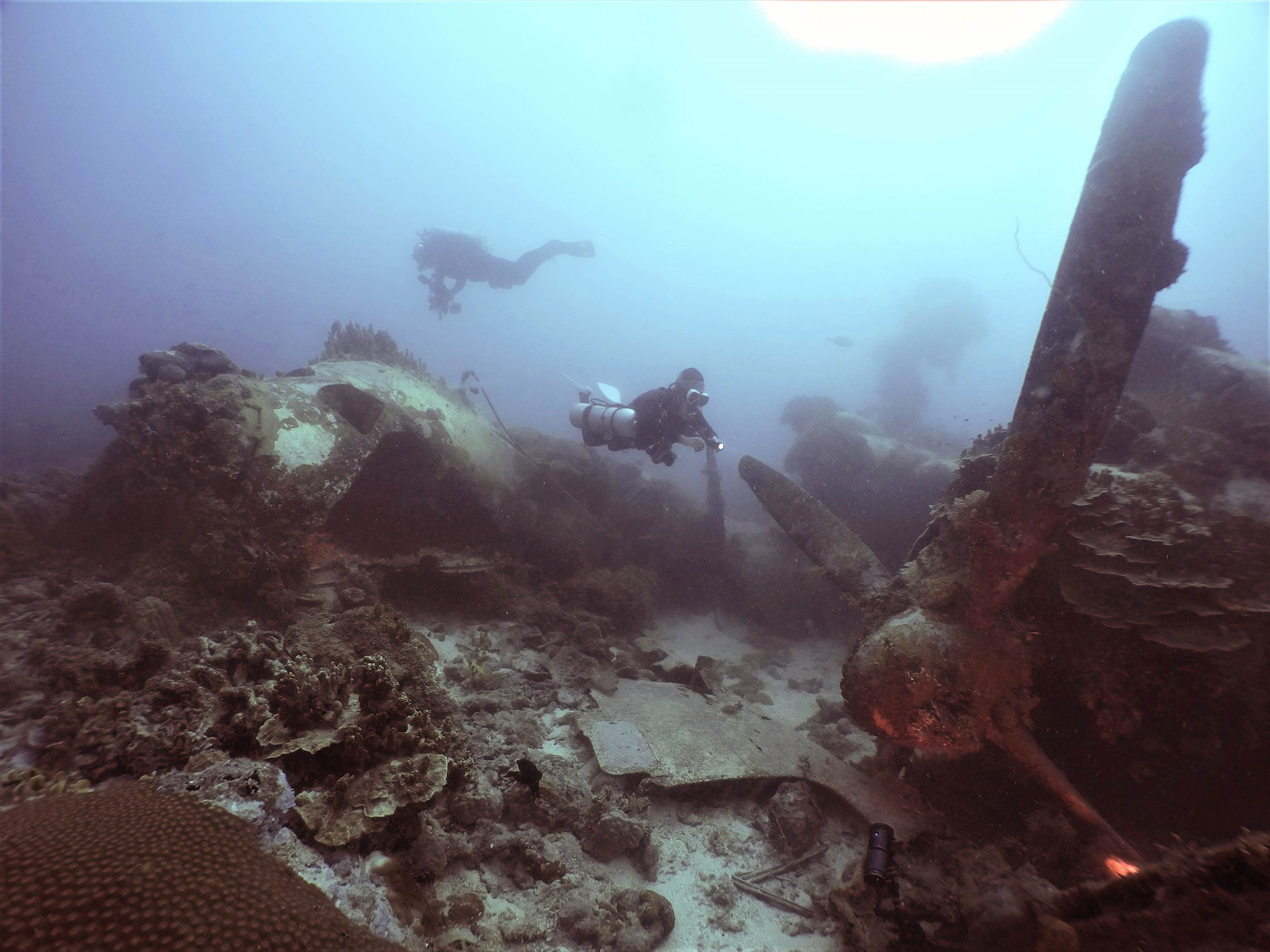 Emily sea plane